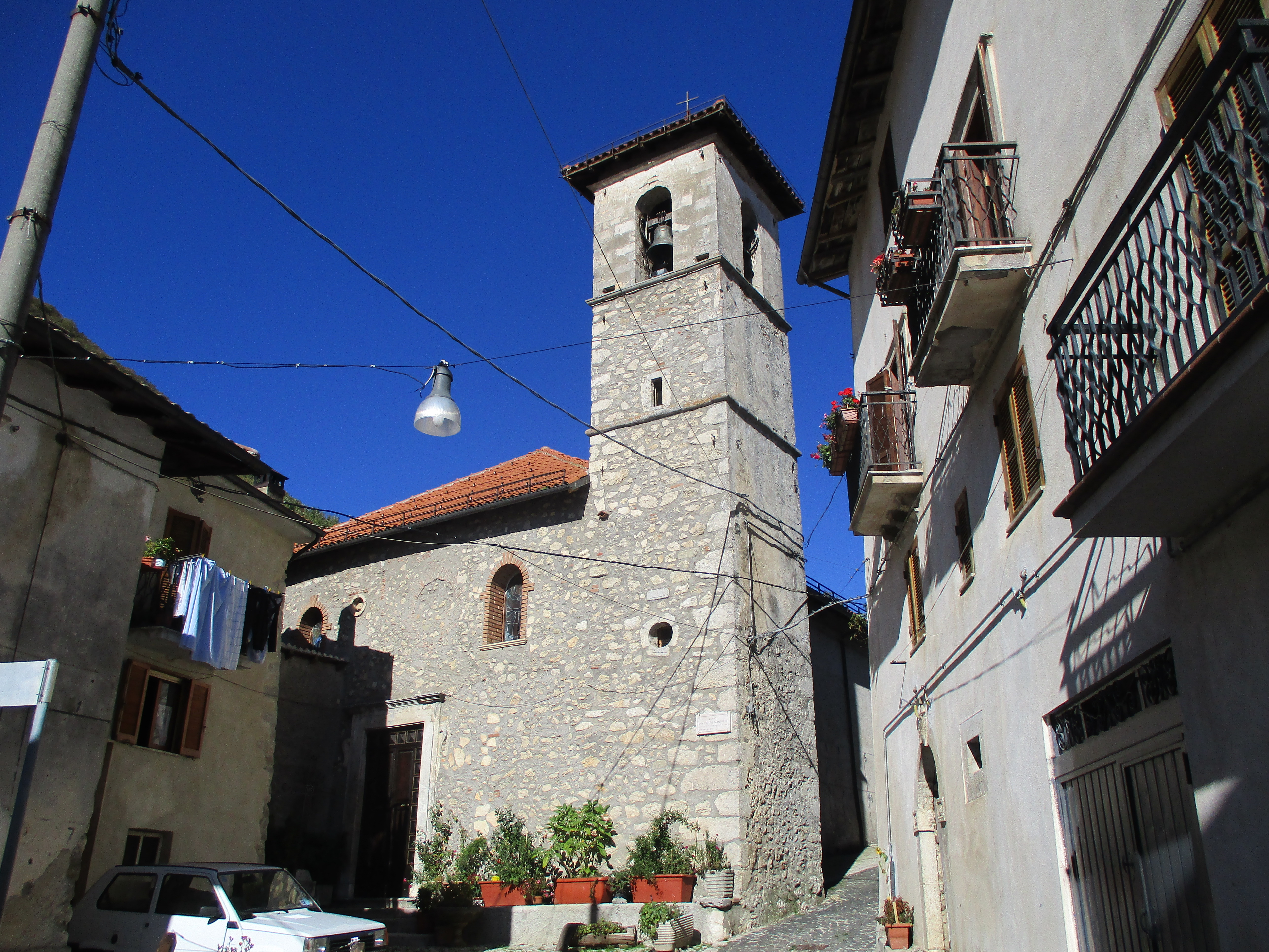 Facciata della chiesa